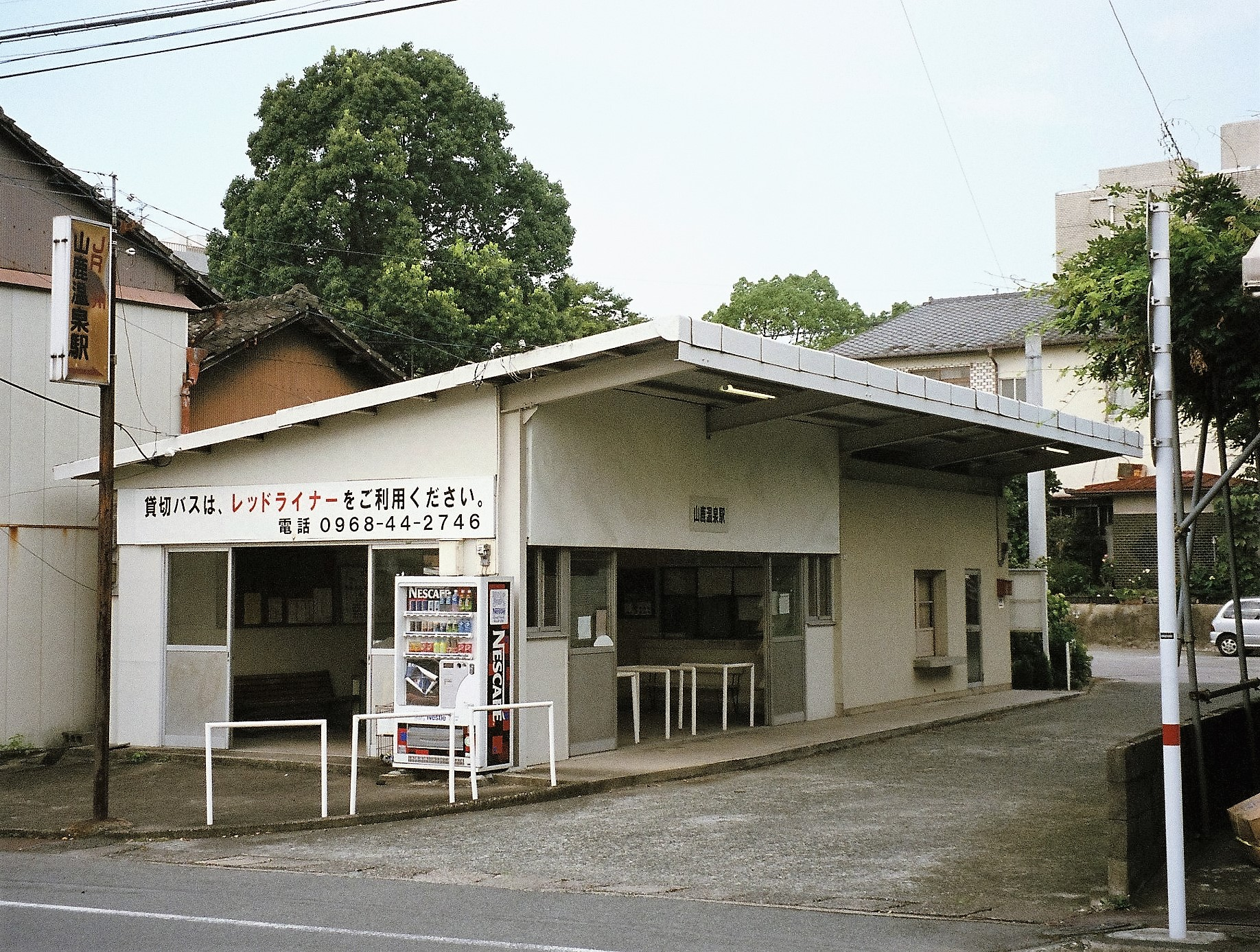 JR九州バス山鹿温泉駅（2004年8月撮影）